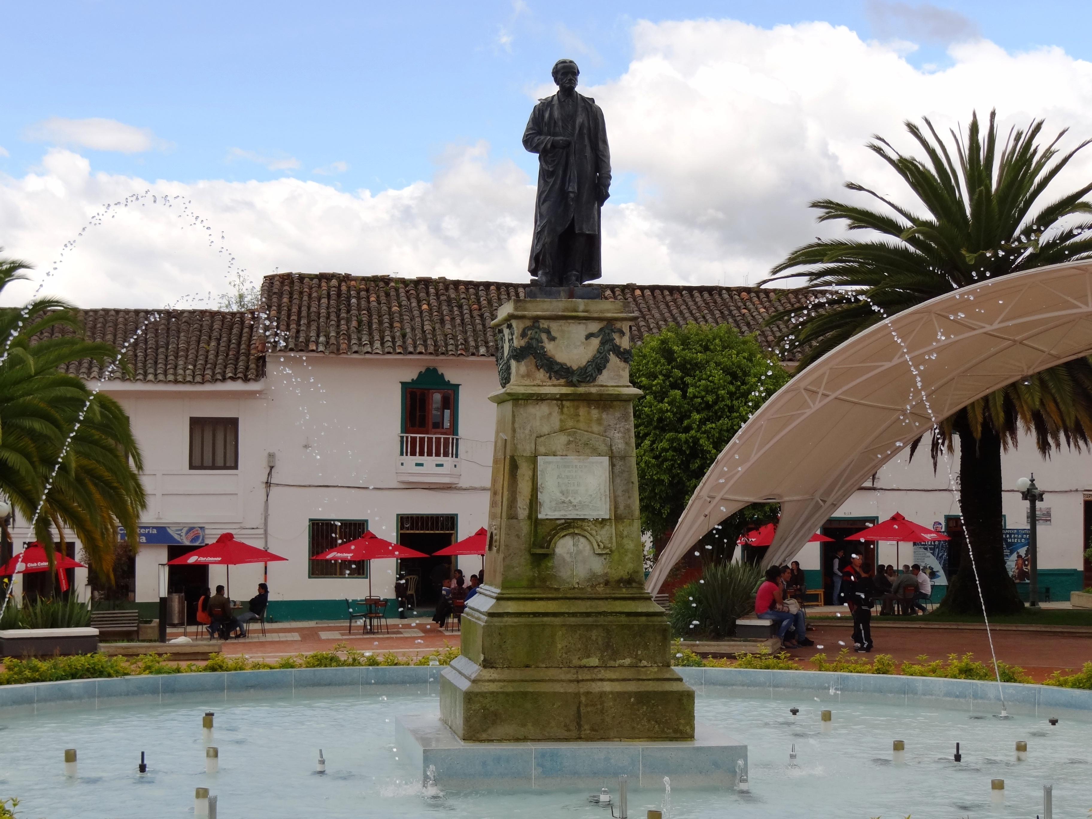 Monumento conmemorativo a José Ignacio de Márquez en el parque principal del municipio de Ramiriqui, departamento de Boyacá, Colombia